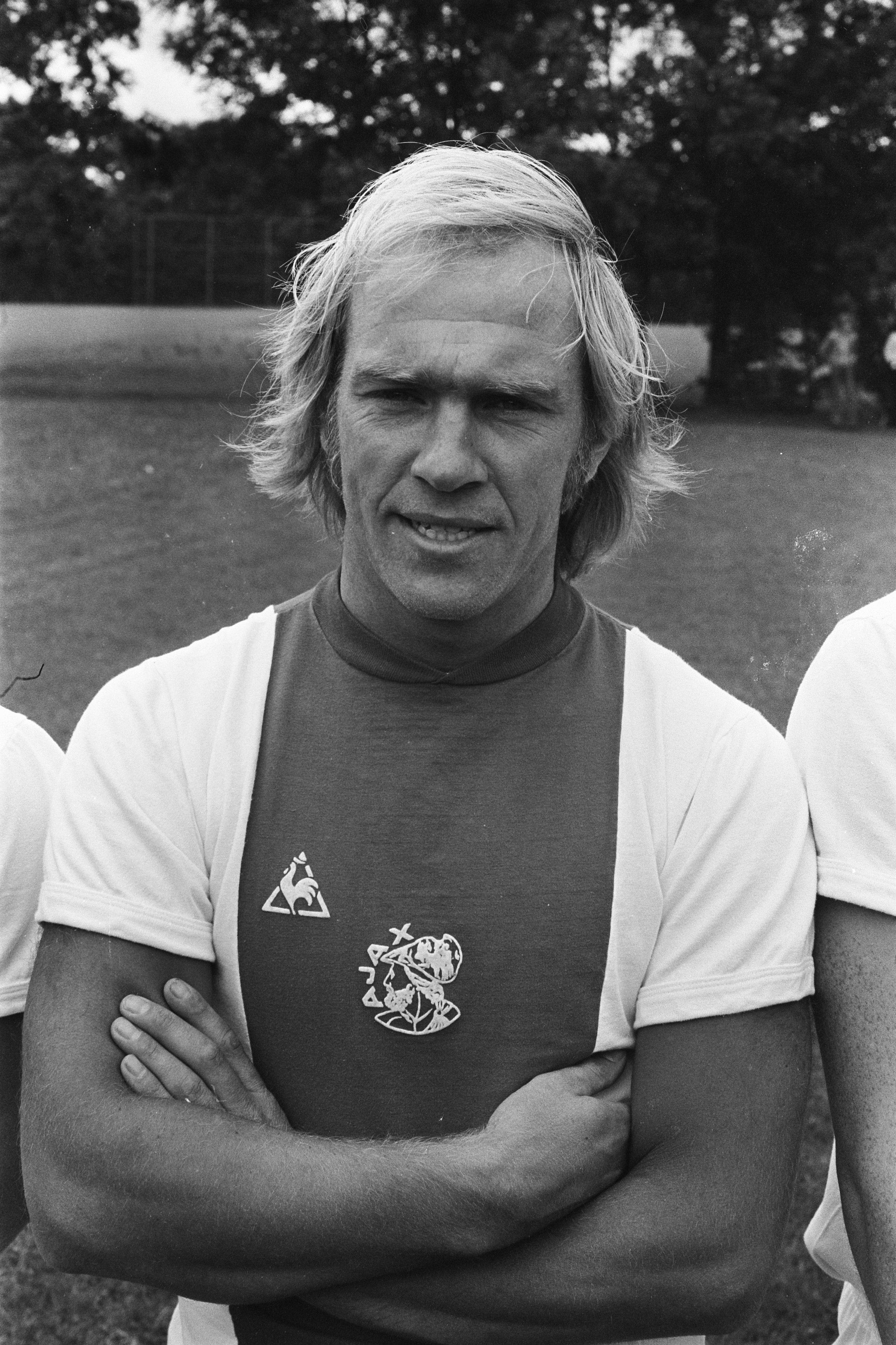 Collectie / Archief : Fotocollectie Anefo Reportage / Serie : Ajax presenteert de nieuwe selectie voor het aankomende voetbalseizoen 1975-1976 Beschrijving : Willy Brokamp Datum : 15 juli 1975 Locatie : Amsterdam, Noord-Holland Trefwoorden : portretten, sport, voetbal Persoonsnaam : Brokamp, Willy Instellingsnaam : AJAX Fotograaf : Fotograaf Onbekend / Anefo Auteursrechthebbende : Nationaal Archief Materiaalsoort : Negatief (zwart/wit) Nummer archiefinventaris : bekijk toegang 2.24.01.05 Bestanddeelnummer : 928-0506